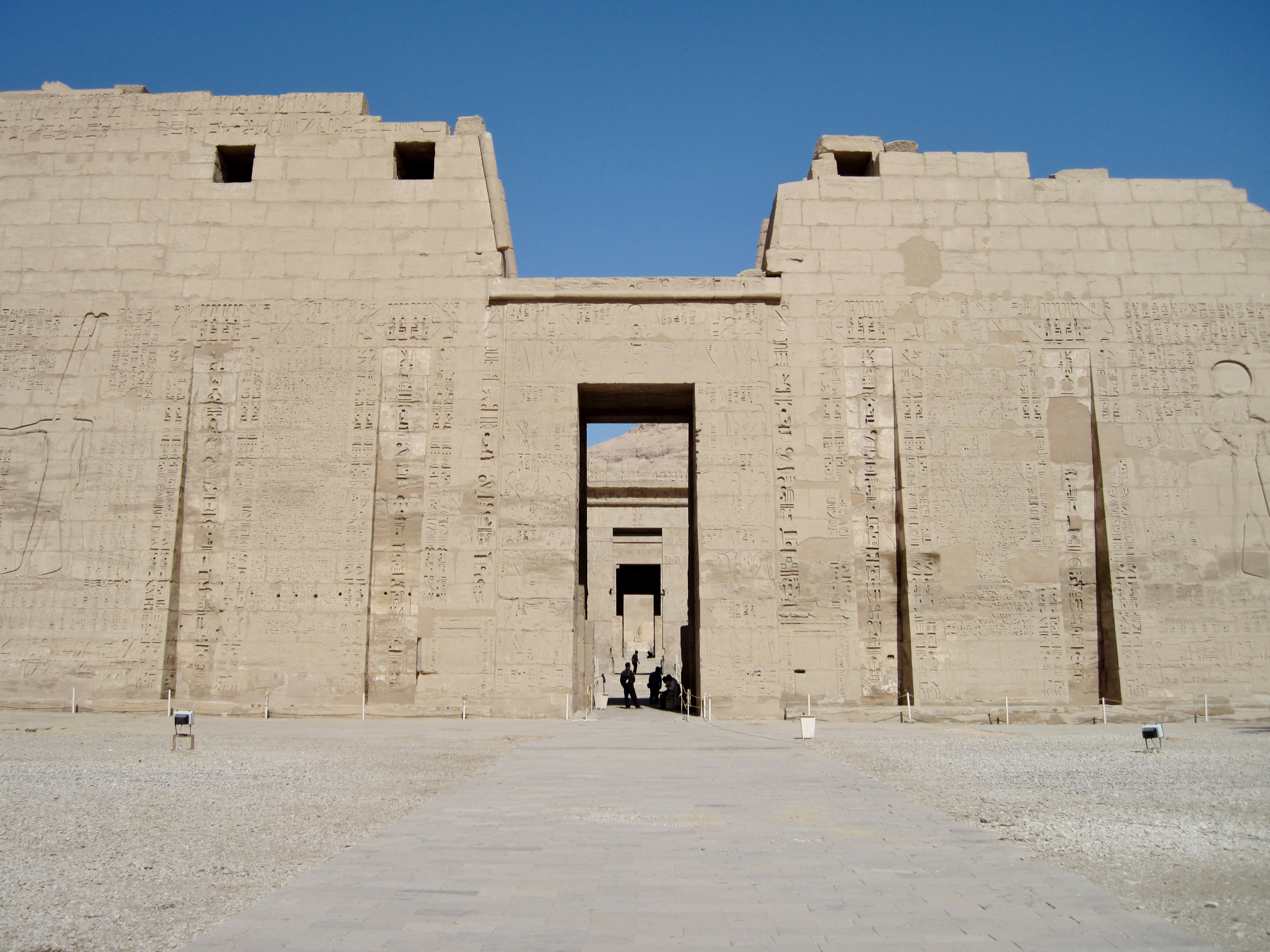 Erster Pylon des Totentempels Ramses’ III. in Medinet Habu, Ägypten